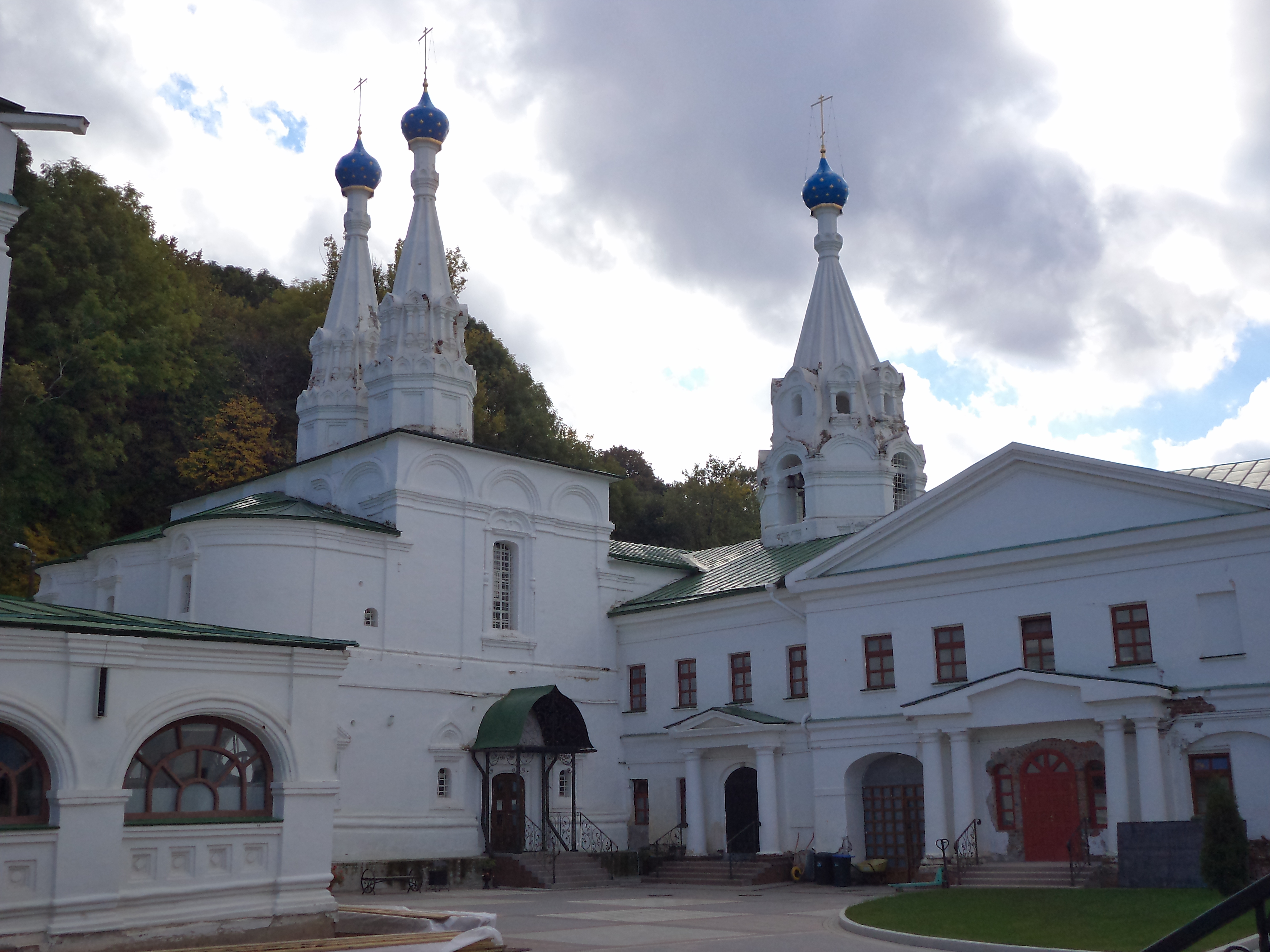 Благовещенский монастырь. Церковь Успения Пресвятой Богородицы: переулок Мельничный, 7б, Нижний Новгород, Нижегородская область